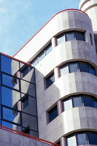 Edíficio Prémio Valmor 1988